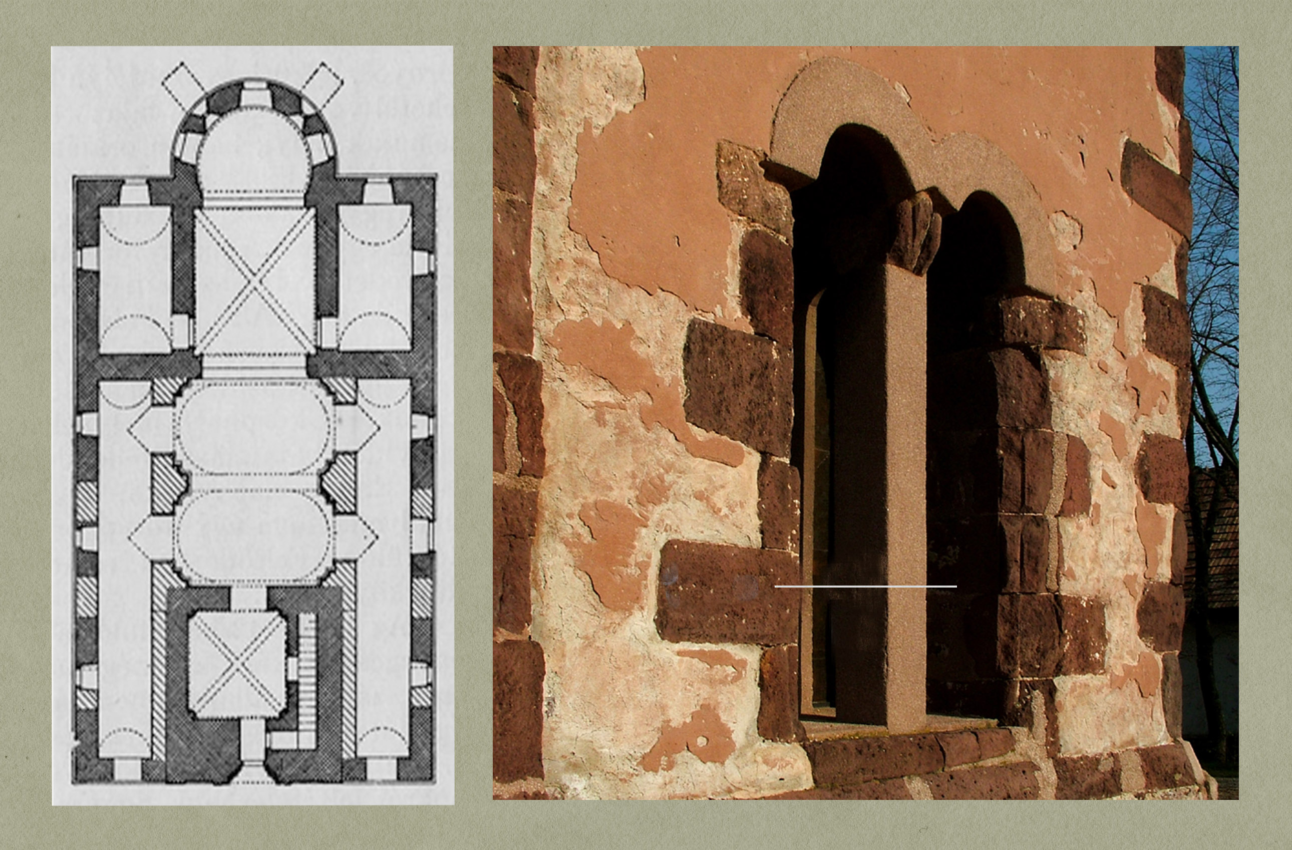 A felsőörsi Mária Magdolna-templom alaprajza és pillérrészlete